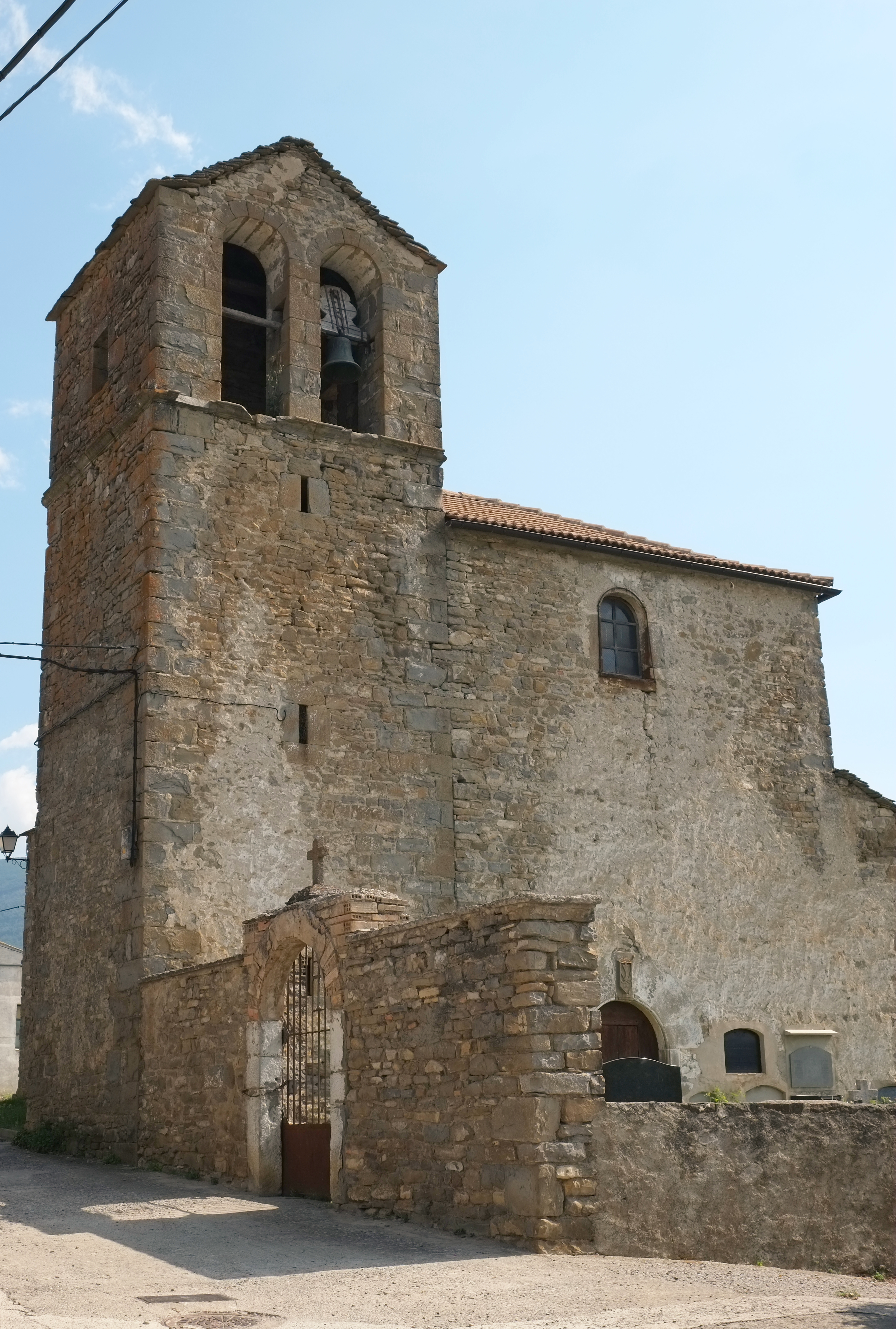 Kirche in Guasa in der Provinz Huesca in Aragonien (Spanien)